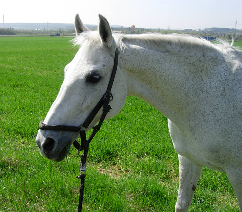 Shagya-Araber - Stute Shagya XXII-49 im Alter von 20 Jahren. Typischer Shagya-Araber-Schimmel. Shagya XXII-49 wurde 1986 im Staatsgestüt Topoľčianky in der Slowakei geboren. Sie ist Tochter des Zuchthengst Shagya XXII, der im Staatsgestüt Bábolna in Ungarn von 1974 - 1976 als Hengst Shagya XLV geführt wurde. Es ist bei dieser Stute deutlich zu sehen, dass diese Araberrasse größer als die zierlichen Vollblutaraber gebaut ist. – Weitere Bilder von Shagya XXII-49 und Infos zum Thema Shagya-Araber